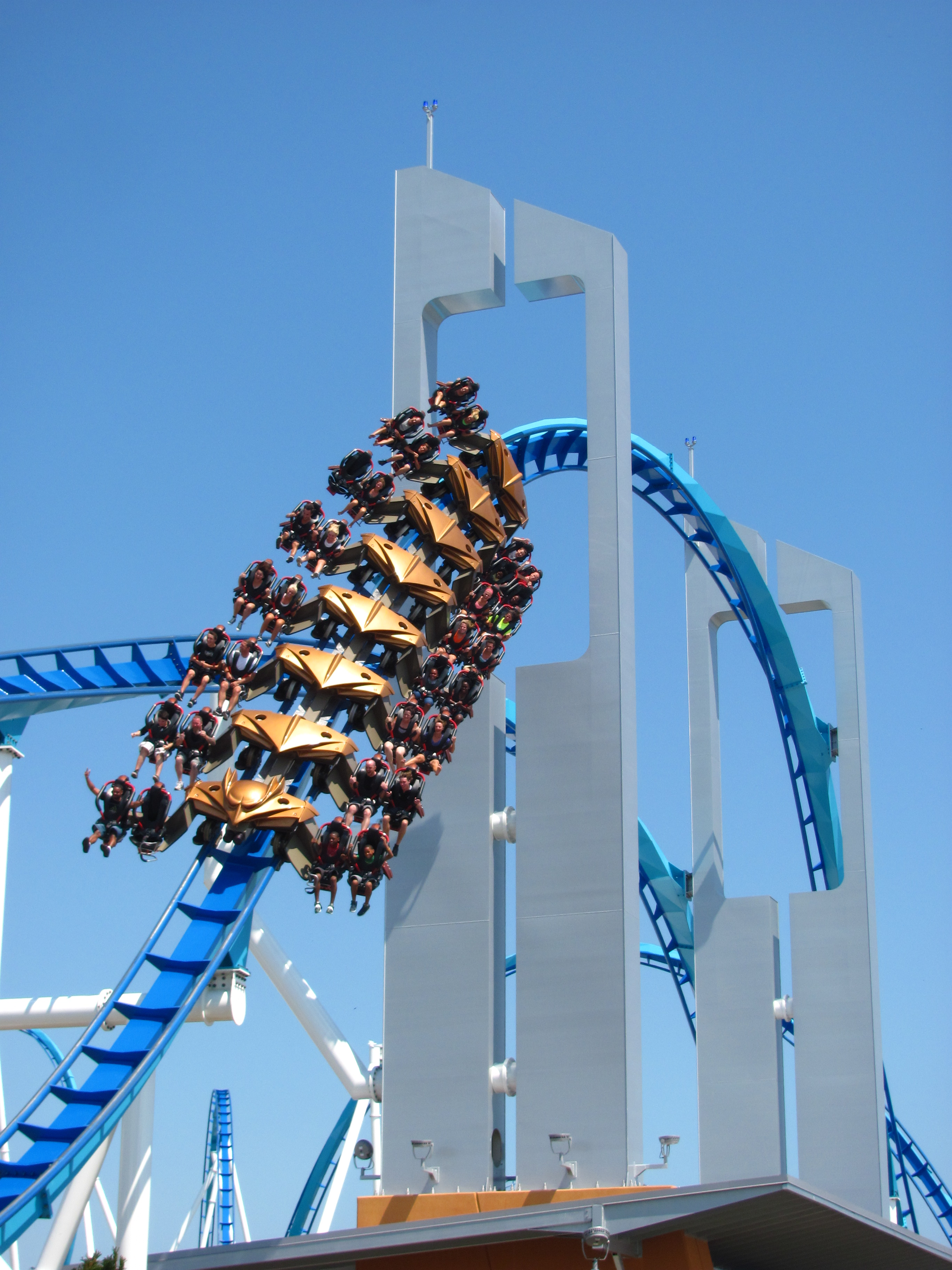 Cedar Point 020